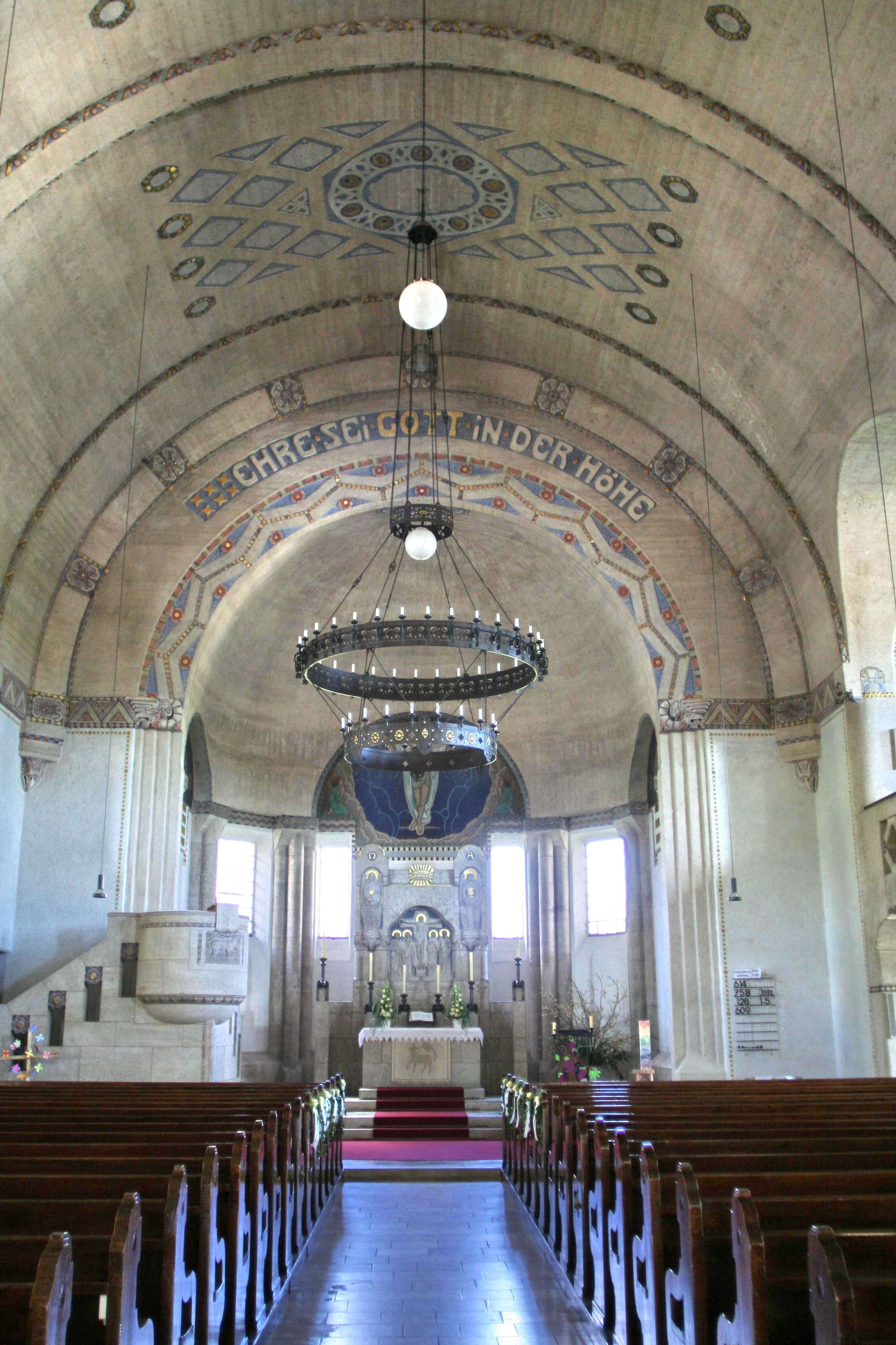 Bad Steben, Lutherkirche